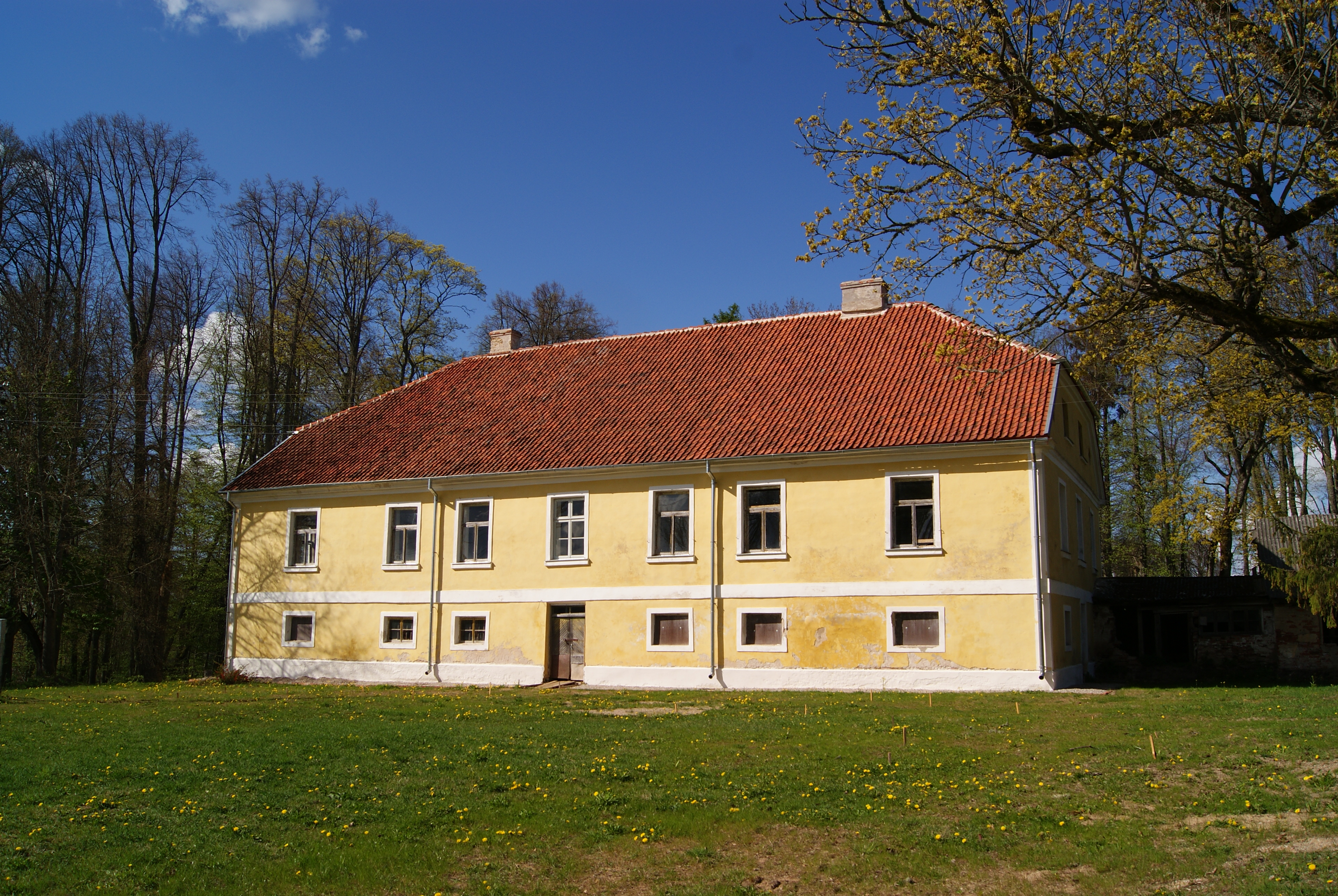 Rudes muiža